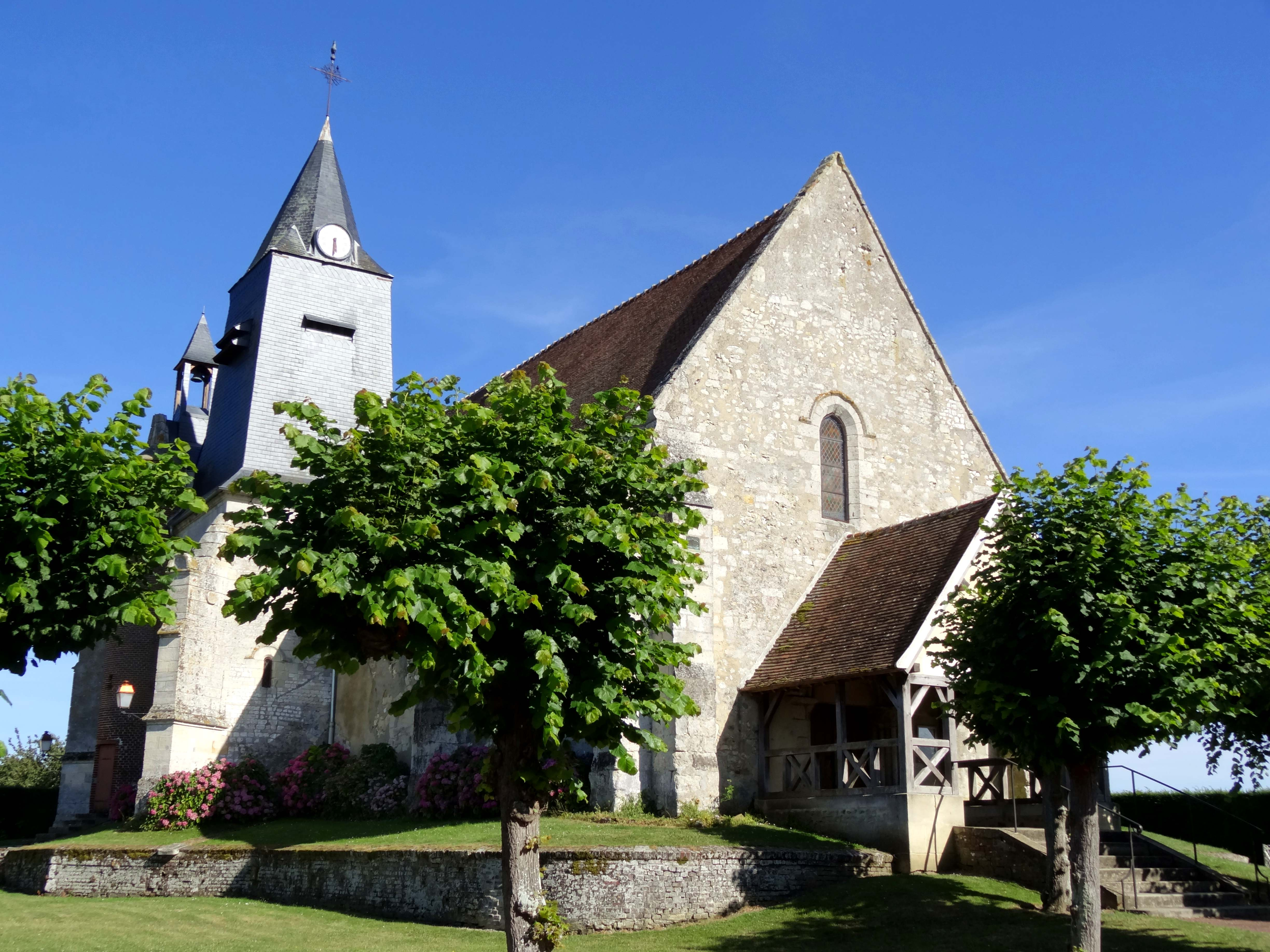 Église Saint-Lucien de Litz - voir titre.